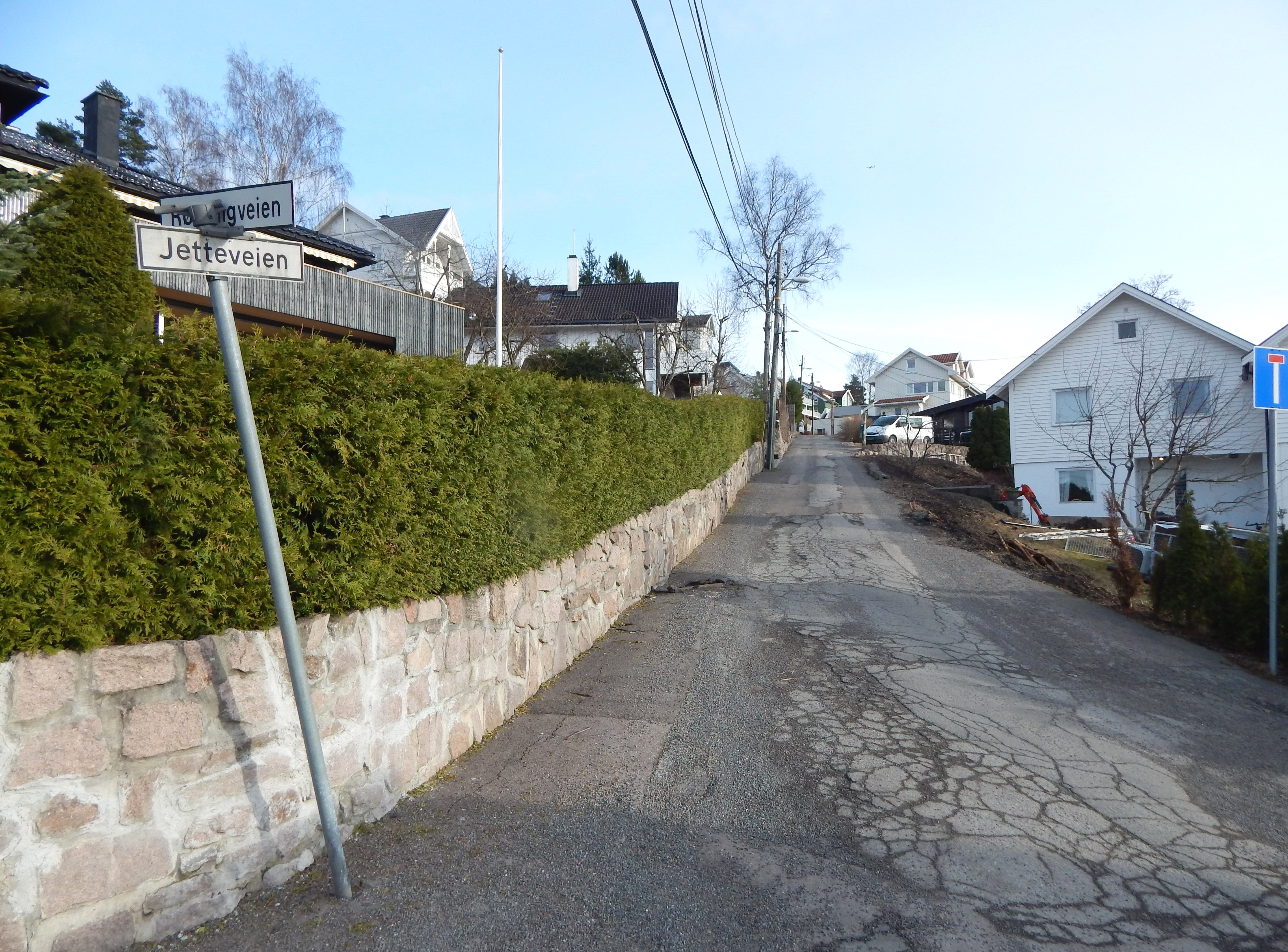 Jetteveien på Kjelsås i Oslo